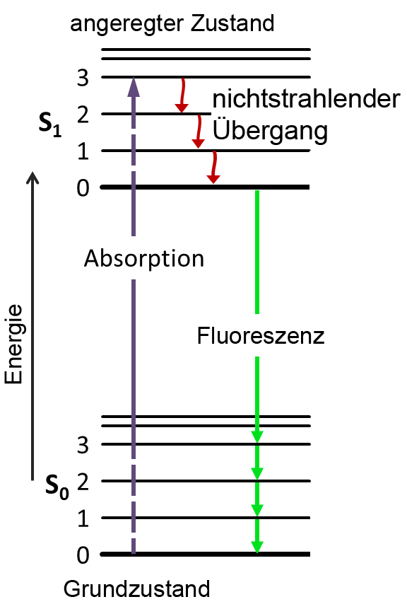 Jablonski-Diagramm speziell für Fluoreszenz